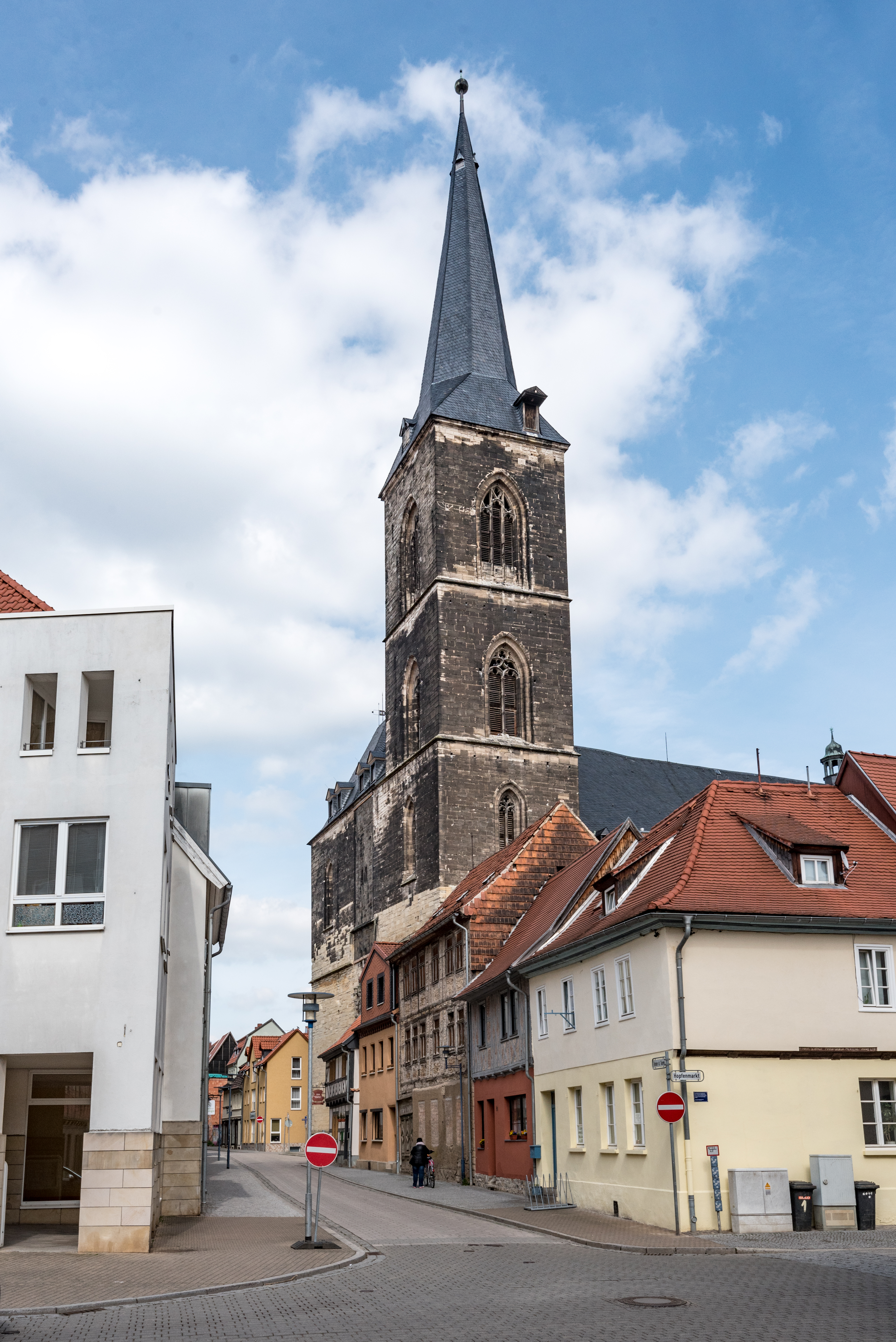 Aschersleben, Stephanikirche